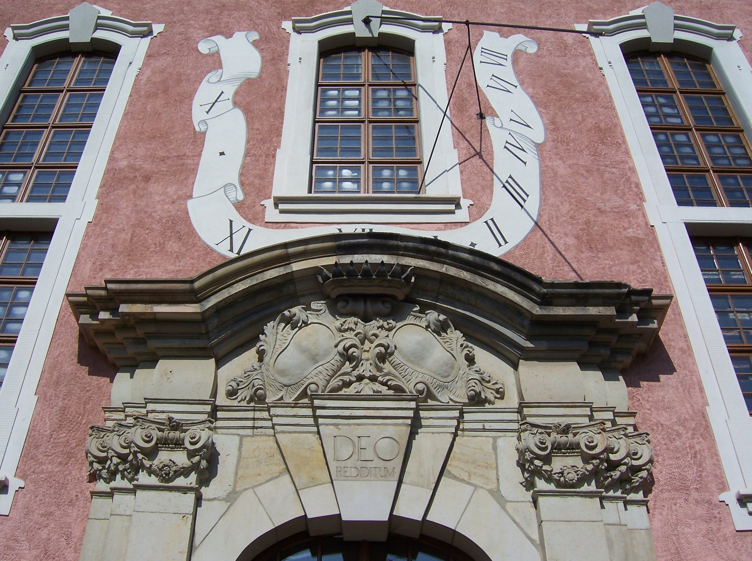 Teil des südlichen Hauptportals der Loschwitzer Kirche in Dresden und die darüber befindliche Vertikalsonnenuhr.